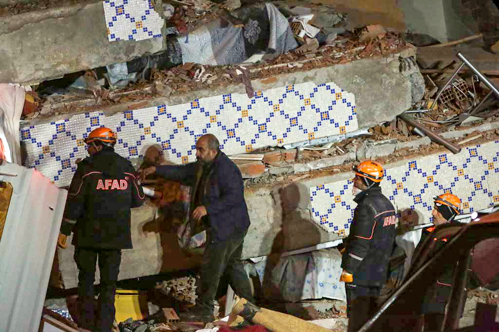 Elazığ Depremi kurtarma çalışmaları